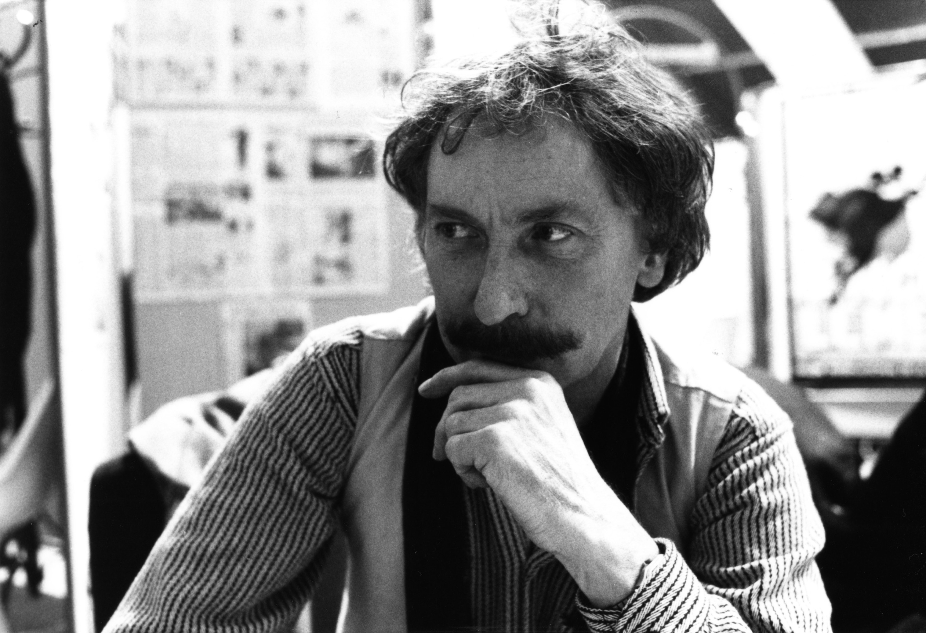 Jean-Claude Forest, fotograferad av Cristian Hammarström på seriefestivalen i Angoulême i januari 1987.